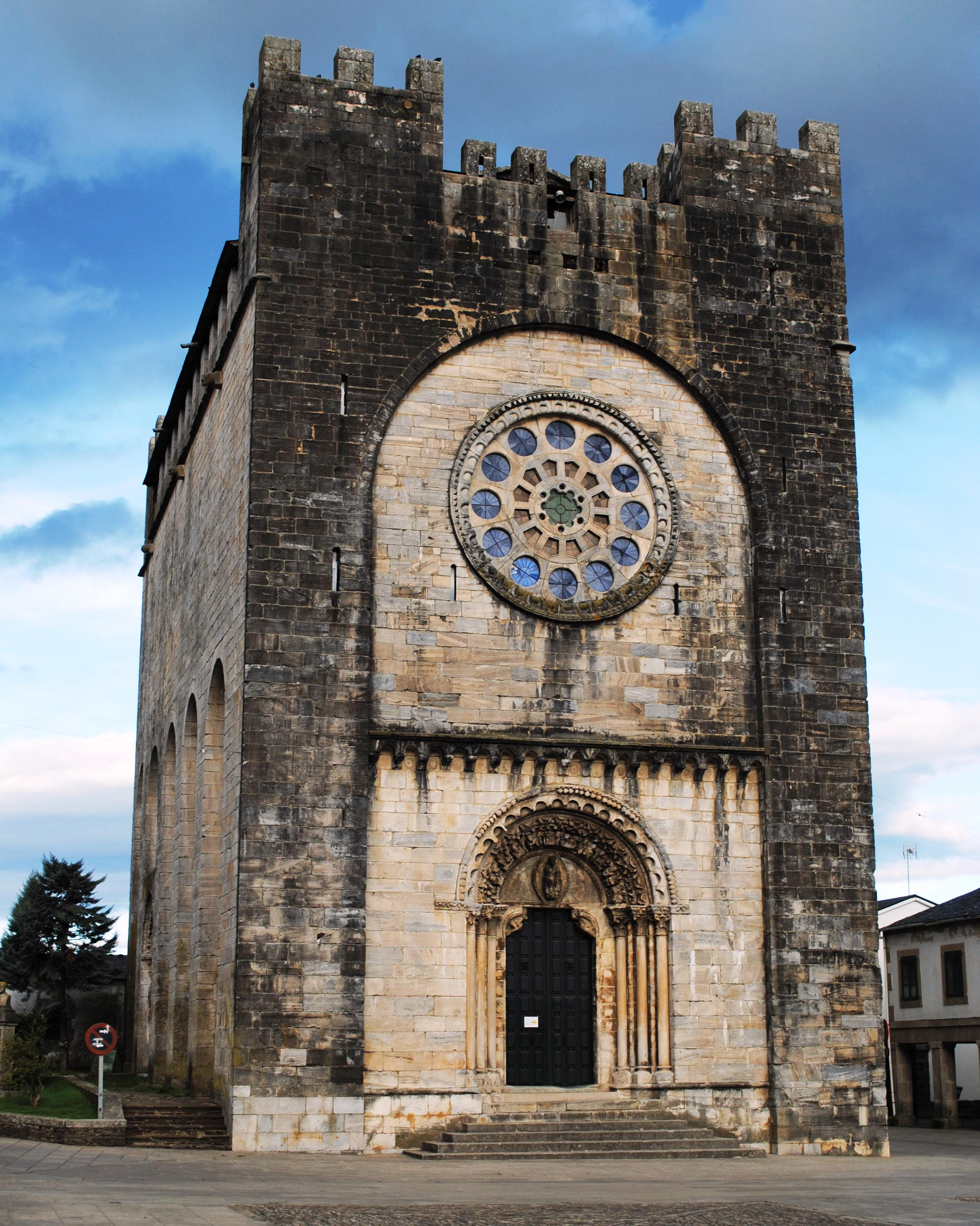 Vexa o título e as categorías